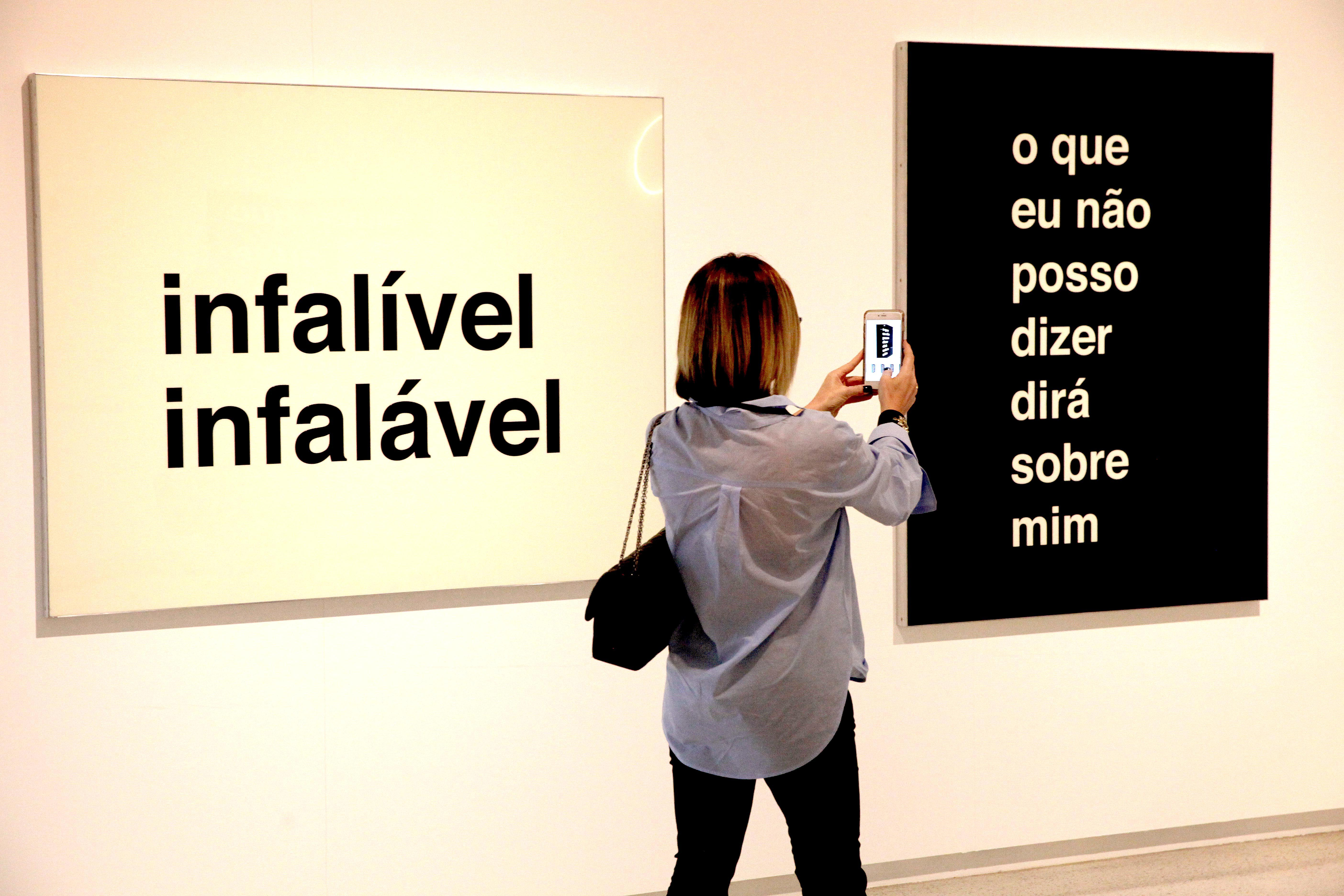 Curitiba 05-10-2017 O tapete, quando fotografado de um celular, dá lugar a um rosto. O arroz, tradicional ingrediente chinês, fica colorido em tela e o bicho da seda é um dos elementos usados para realizar uma obra. Tudo isso pode ser visto na Bienal Internacional de Curitiba 2017, evento apoiado pelo Ministério da Cultura (MinC), em cartaz até 25 de fevereiro de 2018. O evento, considerado o maior da América Latina, reúne 425 artistas nacionais e internacionais em 100 espaços diferentes da capital paranaense. Um deles é o museu Oscar Niemeyer (MON) que, de 12 salas, tem seis dedicadas à Bienal. A expectativa é que, até fevereiro, cerca de 1 milhão de visitantes passem por lá. Neste ano, uma das grandes atrações é o país homenageado, a China. Fotos: Acacio Pinheiro